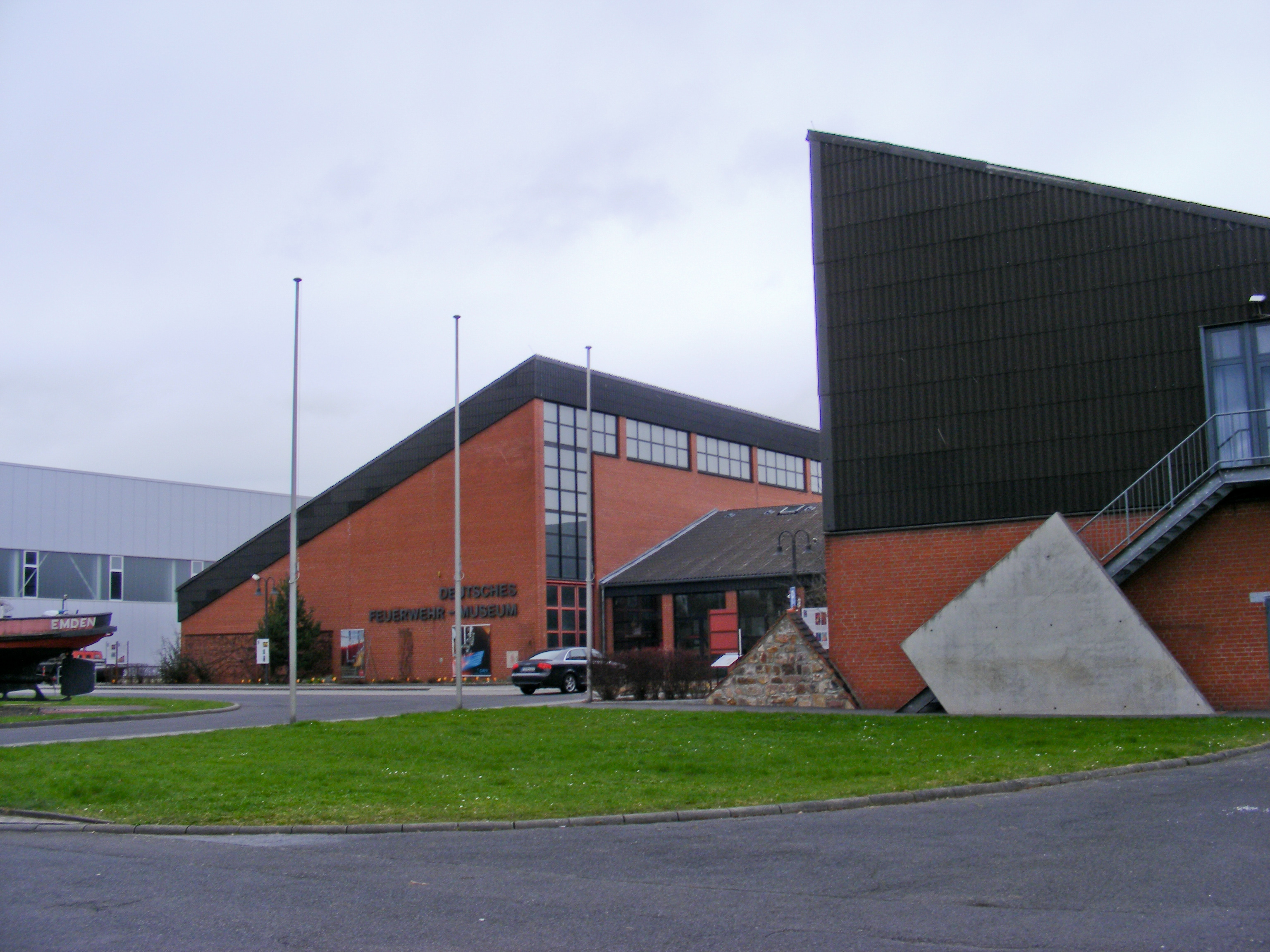 Deutsches Feuerwehrmuseum Fulda – Außenansicht vorn (Werkstatthalle und Feuerlöschboot Emden (Bj. 1943) links im Bild).